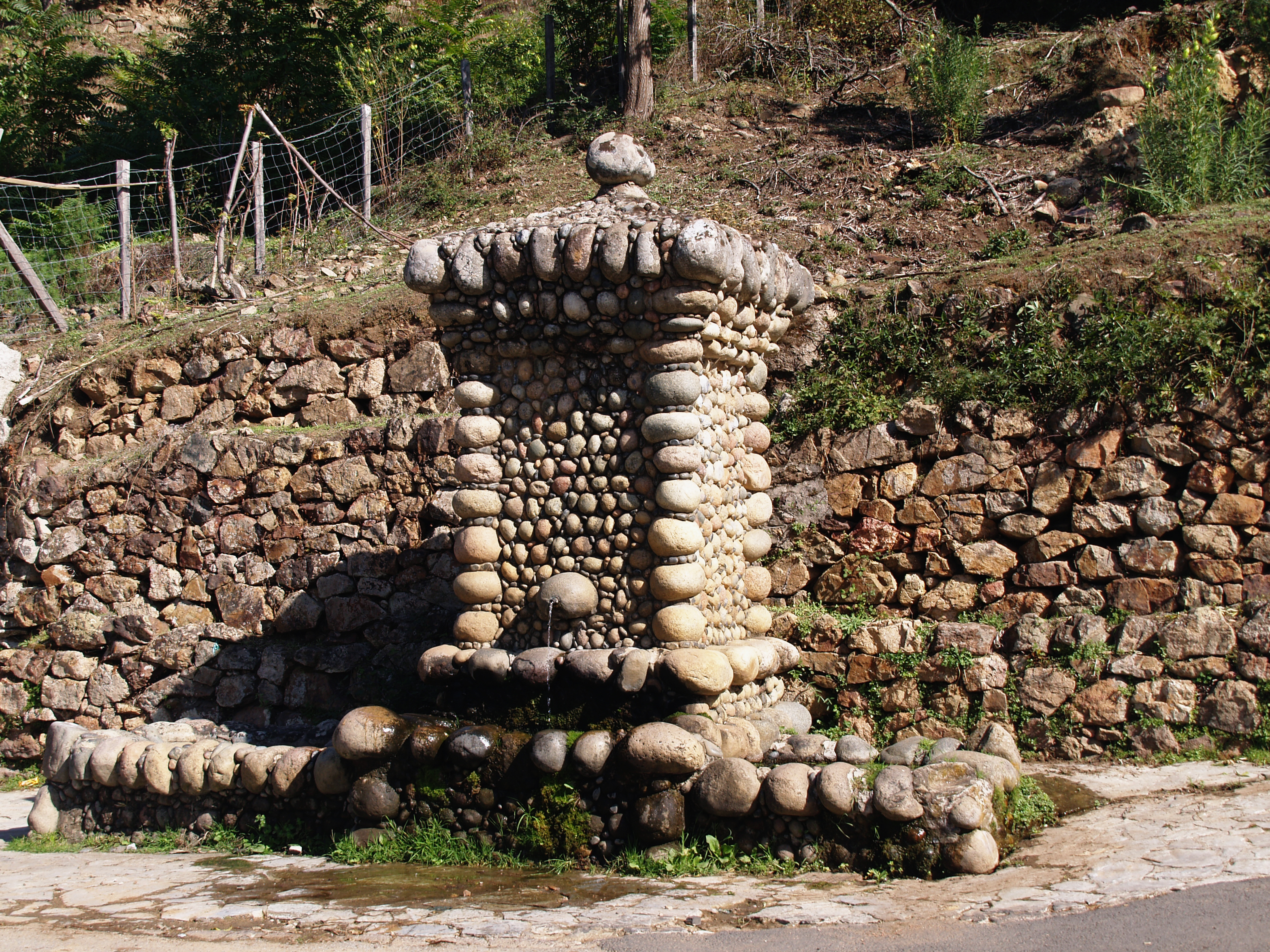 Partinello (Corse-du-Sud) - Fontaine publique sur la RD81